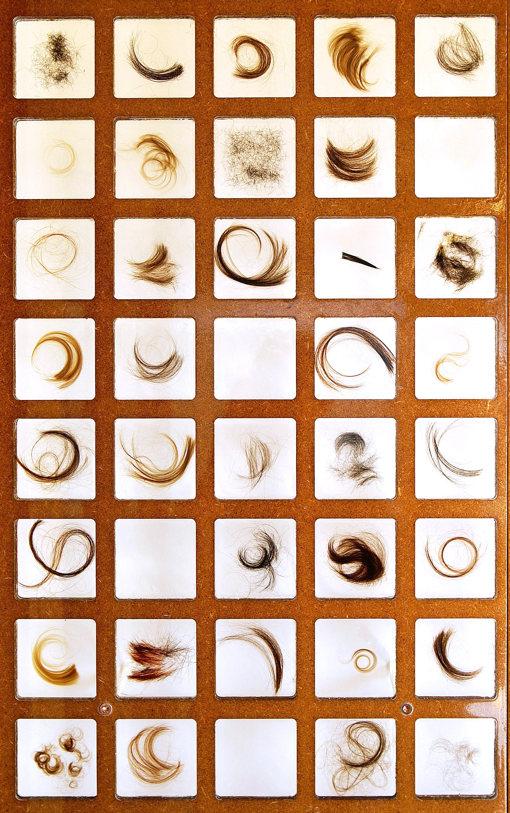 1740 Ichs Für das neue Gemeindehaus in Sulzberg hat Roland Stecher ein unkonventionelles Kunst-am-Bau-Projekt verwirklicht, bei dem ein grosser Teil der Einwohner der bregenzerwälder Gemeinde mitgewirkt und im wahrsten Sinne des Wortes Haare gelassen hat. Die Installation besteht aus zwei Wandteilen mit insgesamt 8m Länge und 2,5m Höhe, die 1740 transparente Würfel aus Gießharz enthalten. In diese Würfel wurden Haare von 1340 Einwohneren aus Sulzberg eingegossen. Der Gemeindebau wurde von Architekt Gerhard Gruber geplant.